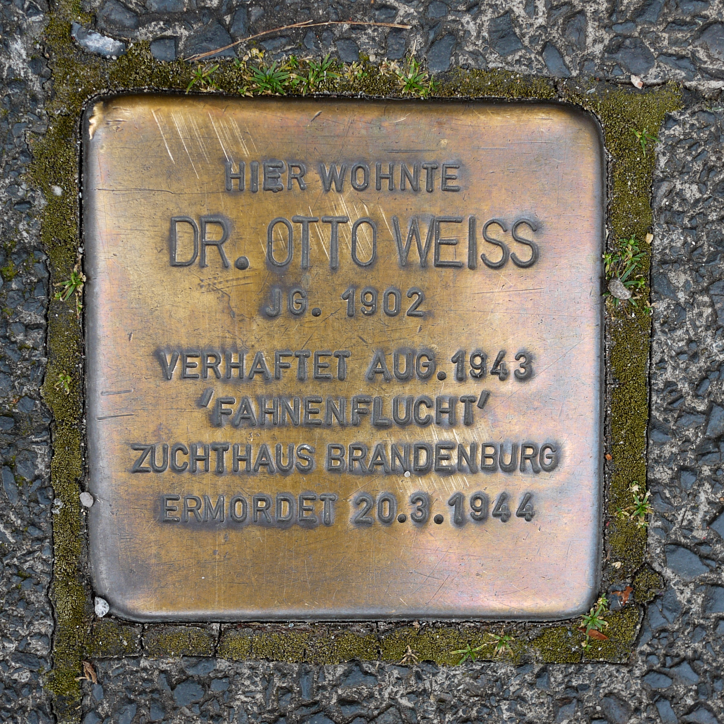 Stolperstein für Dr. Otto Weiß, vor dem Haus Sandstraße 64, Mülheim an der Ruhr (Info-Seite der Stadt MH)